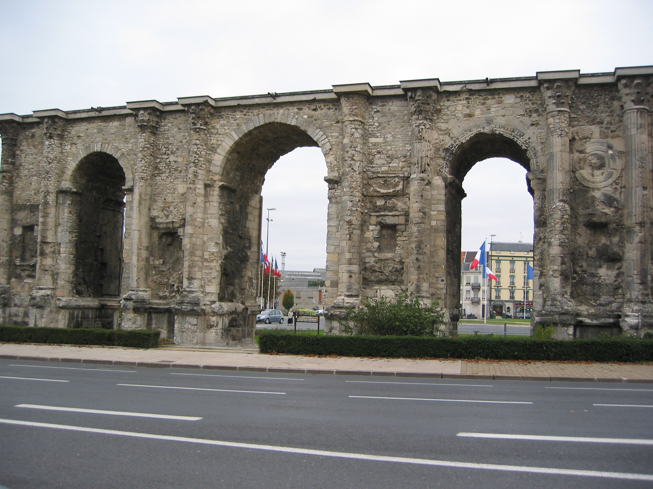 Reims, France.